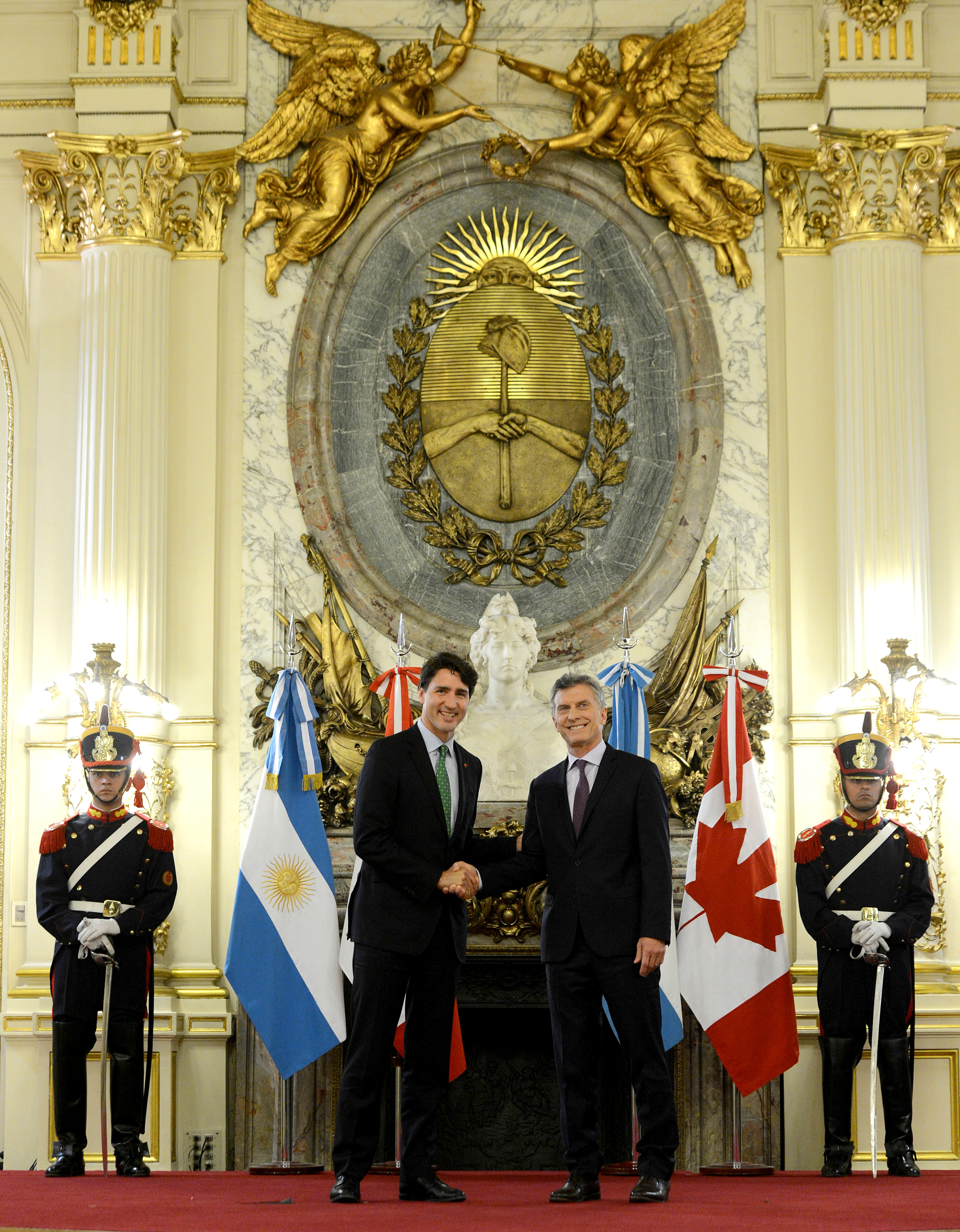 El presidente Mauricio Macri recibió al primer ministro de Canadá, Justin Trudeau, con quien acordó que ambos países establezcan una alianza a largo plazo para avanzar en estrategias que fomenten las inversiones, el comercio y el empleo y que ayuden a mejorar las políticas implementadas sobre gobierno abierto, cuidado del medio ambiente, educación y seguridad, entre otros objetivos comunes.